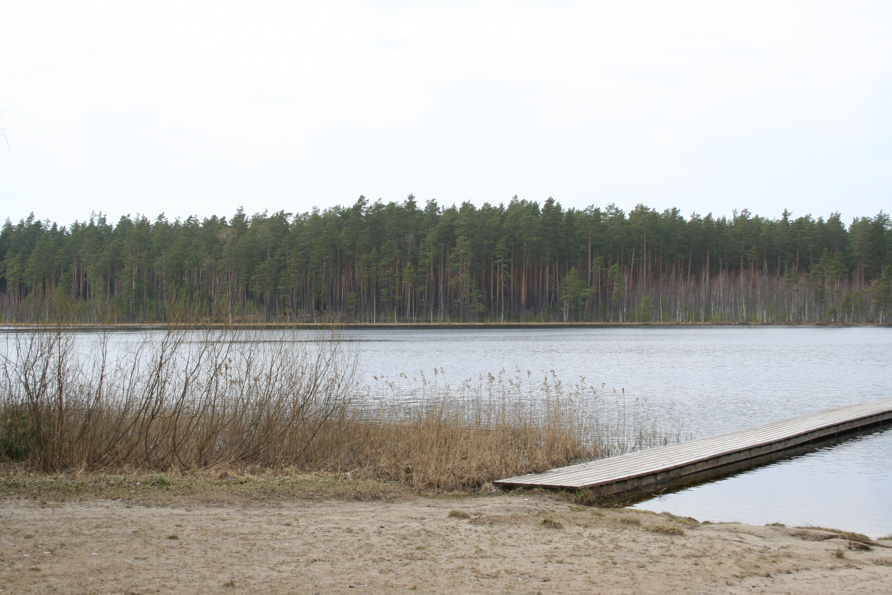 Palojärv (Suur Palojärv, Ihamaru Palojärv), suplemismuul